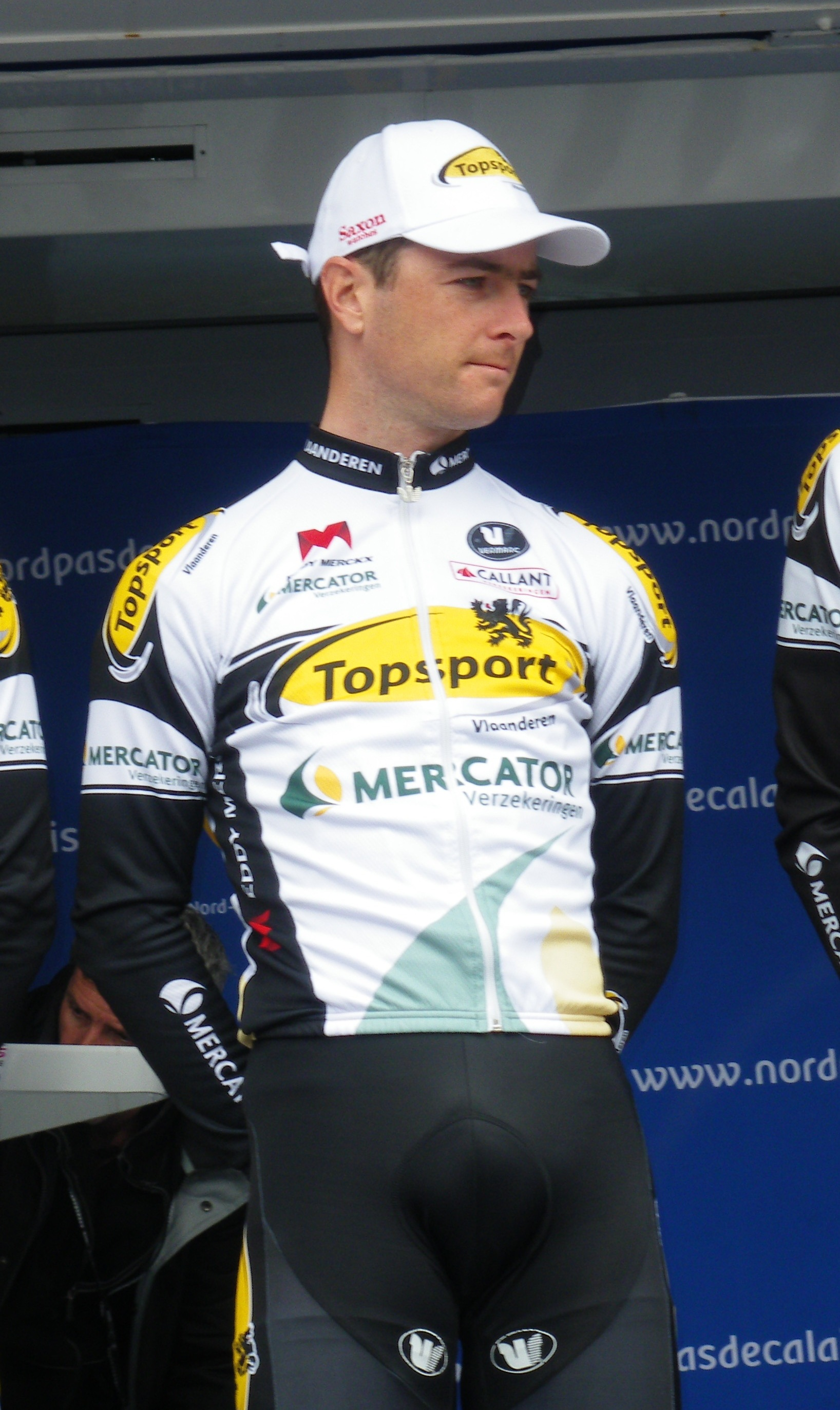 Présentation des coureurs au départ de la dernière étape : Sven Vandousselaere